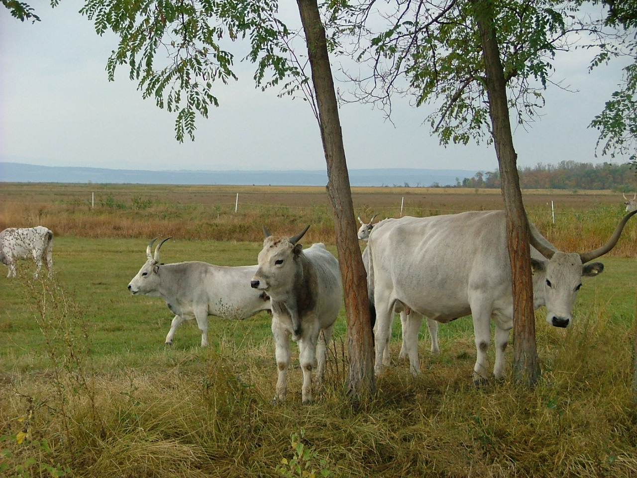 Foto: Bárdos Dezső-Pintye Dávid Győr